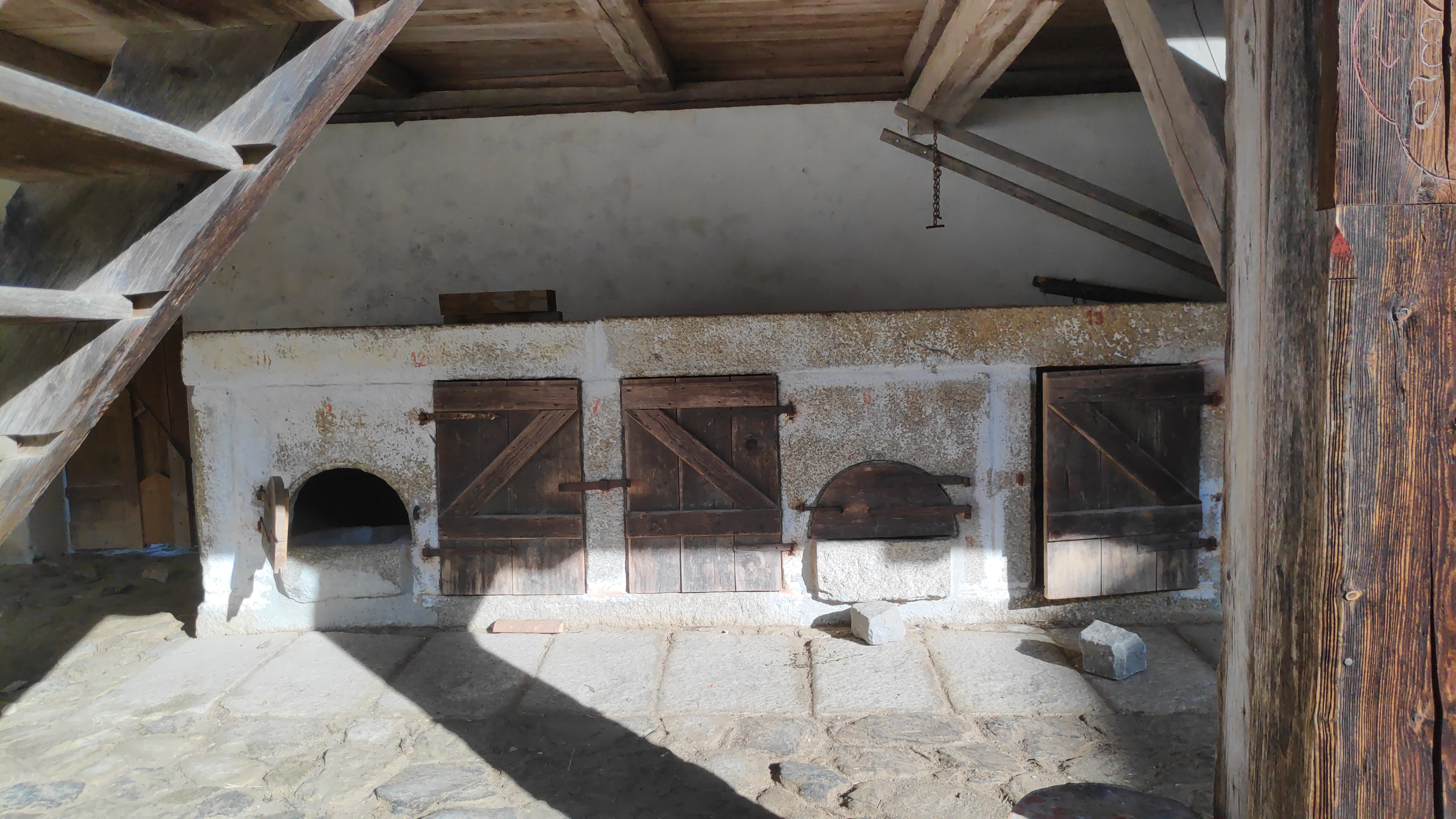 Alter Schweinestall aus einen bayrischen Bauernhof